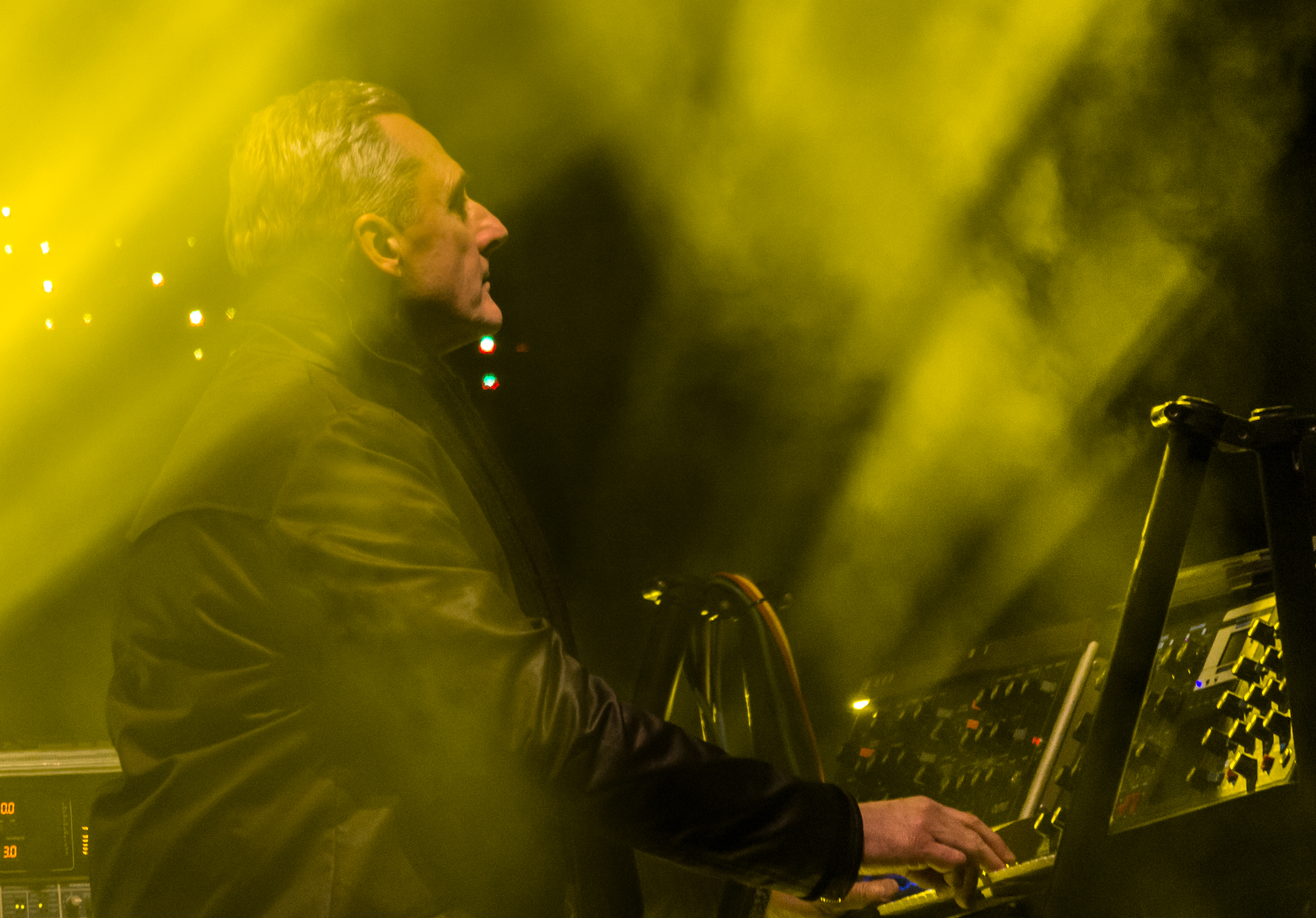 Koncert Marka Bilińskiego podczas I Królewskiego Festiwalu Światła 2013 w Warszawie (Wilanów)